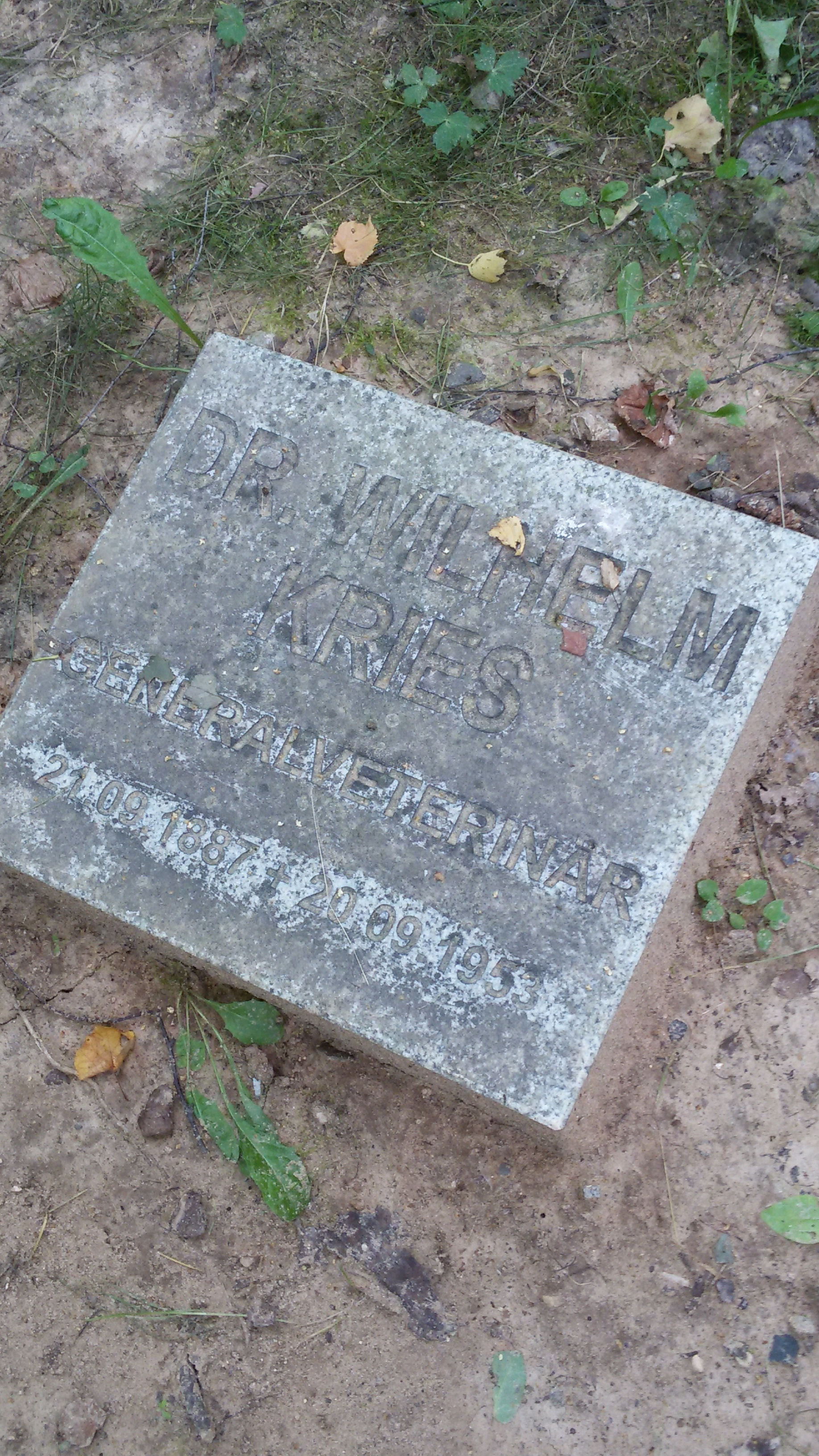 Tombstone; Cherntsy Memorial